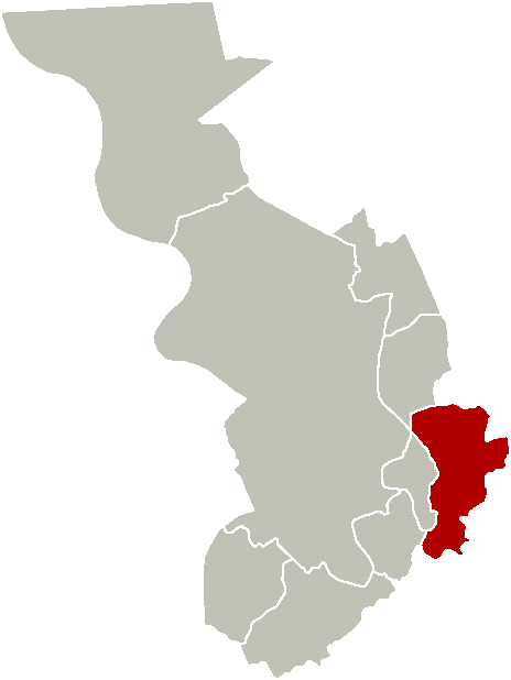 Karte von Antwerpen - Stadtteil Deurne hervorgehoben